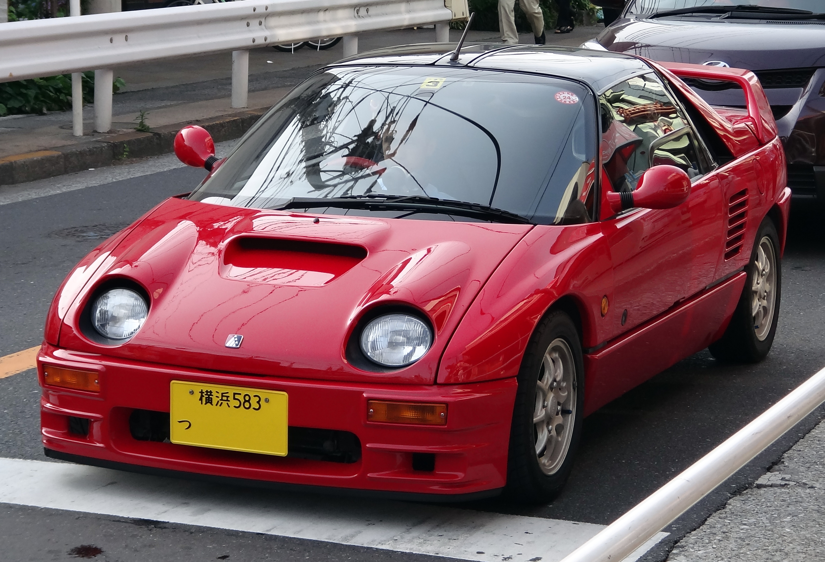 Mazda AZ-1, MazdaSpeed version